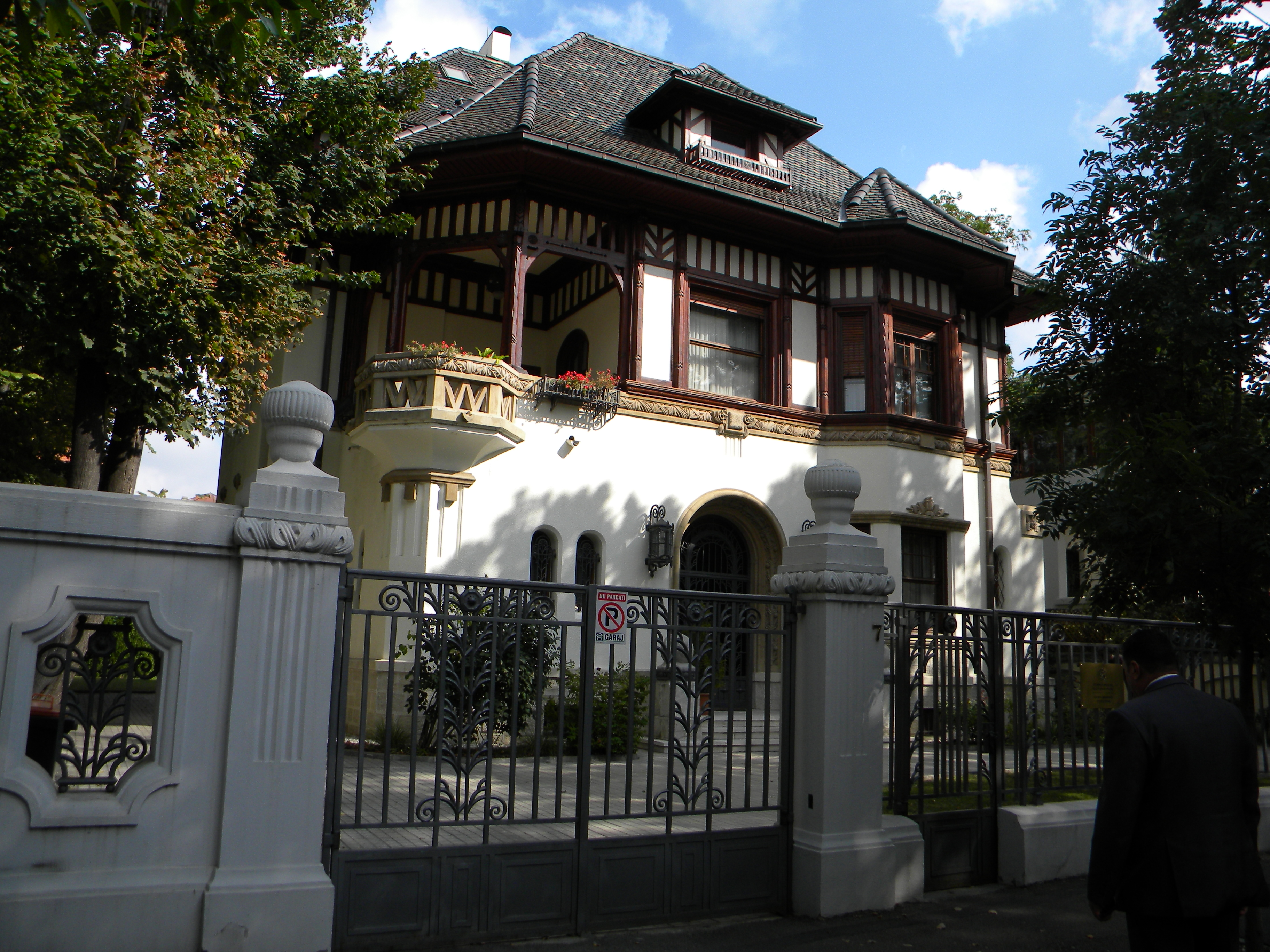 Bucuresti, Romania, Str. Rabat nr. 7, sect. 1 (Vila); B-II-m-B-19493